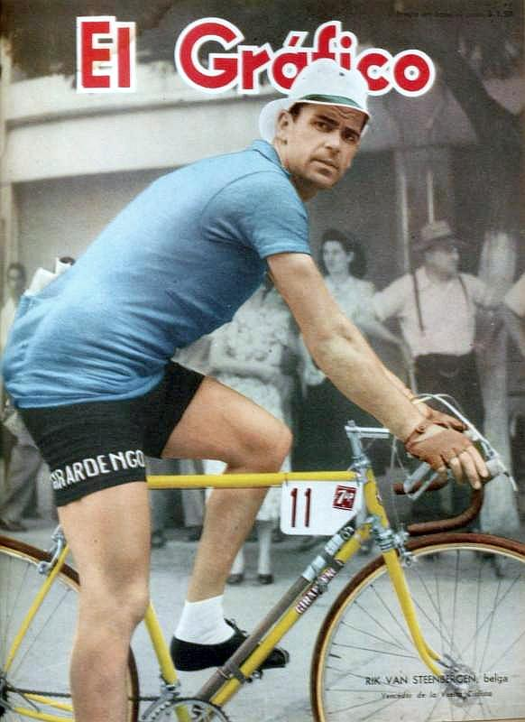 Coberta de la revista El Gráfico:Rik Van Steenbergen-1953